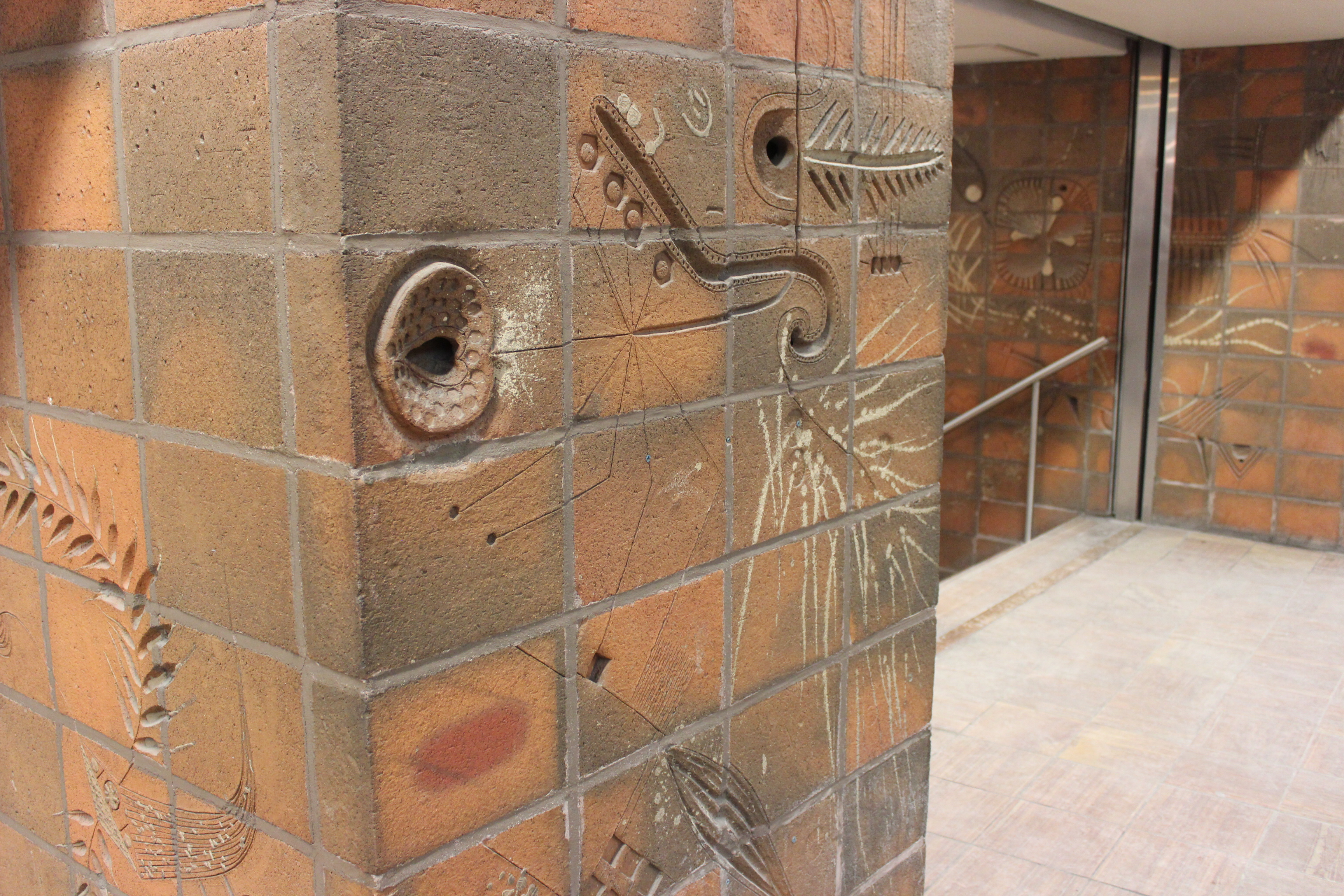 Murale de Maurice Savoie station McGill (1966).